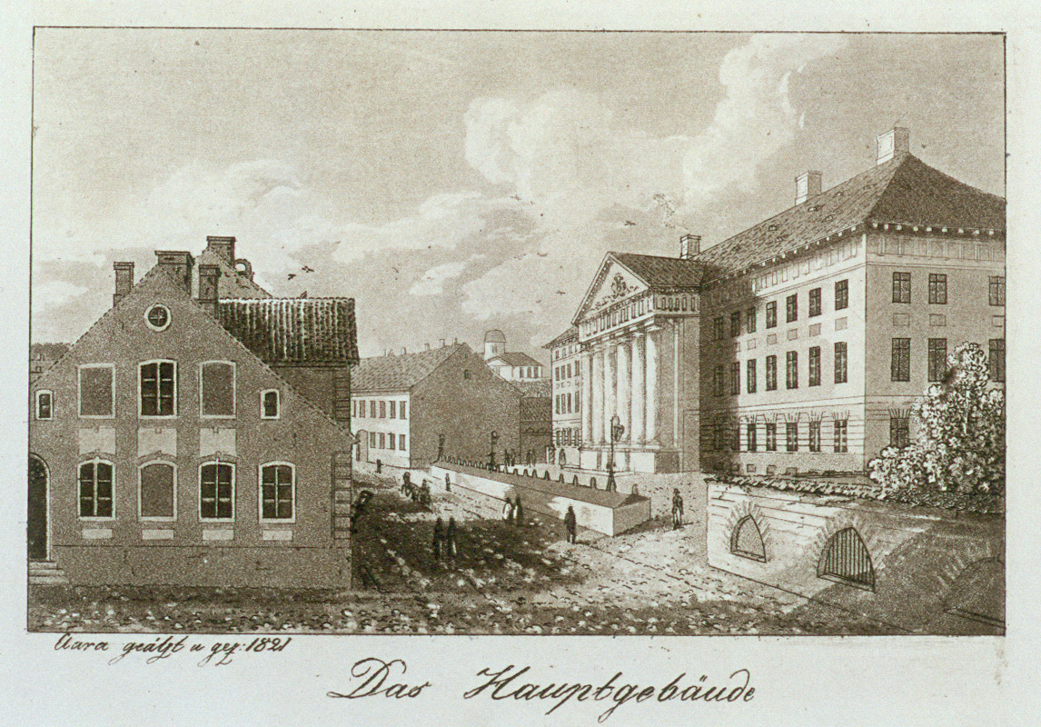 Hauptgebäude der Universität Dorpat (Tartu)